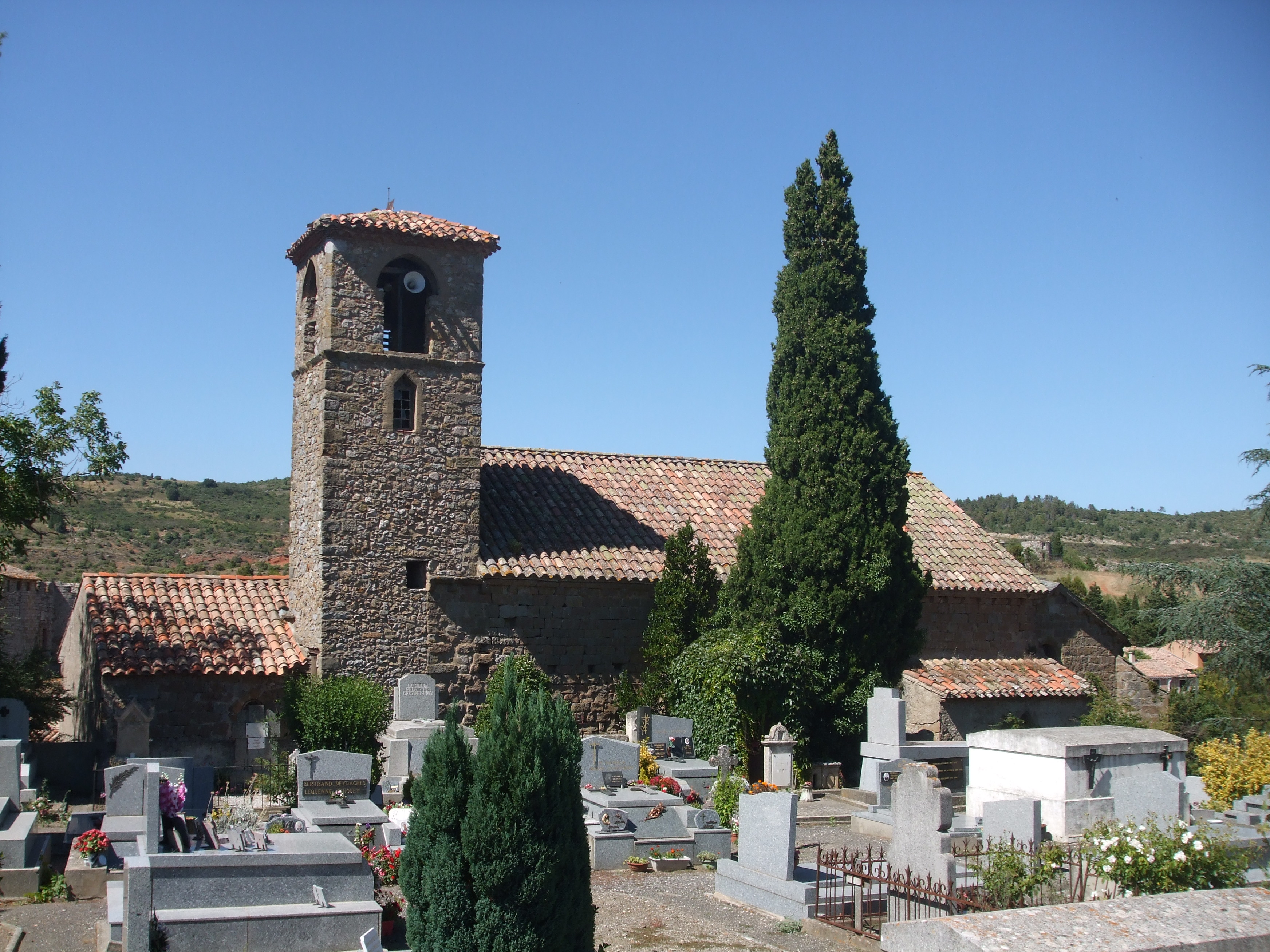 Église Saint-Étienne, (Classé, 1913)